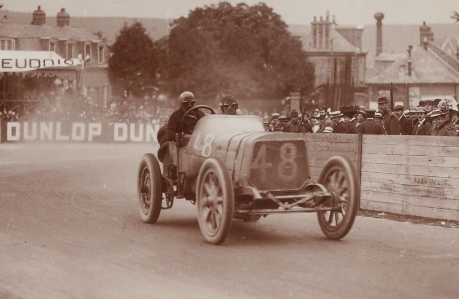 [Collection Jules Beau. Photographie sportive] : T. 34. Années 1907 et 1908 / Jules Beau : F. 48v. [Feuillet vierge]